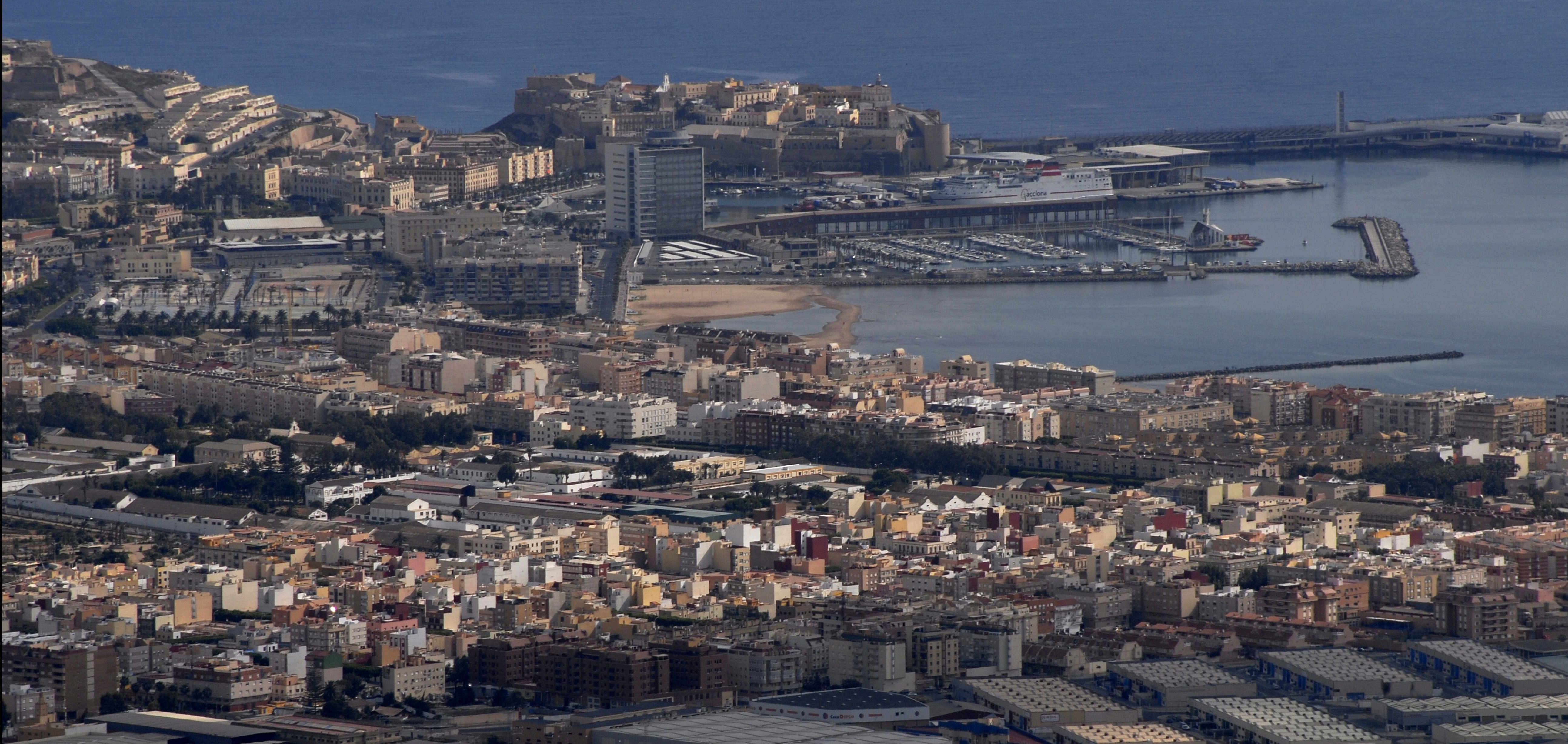 Vista de Melilla